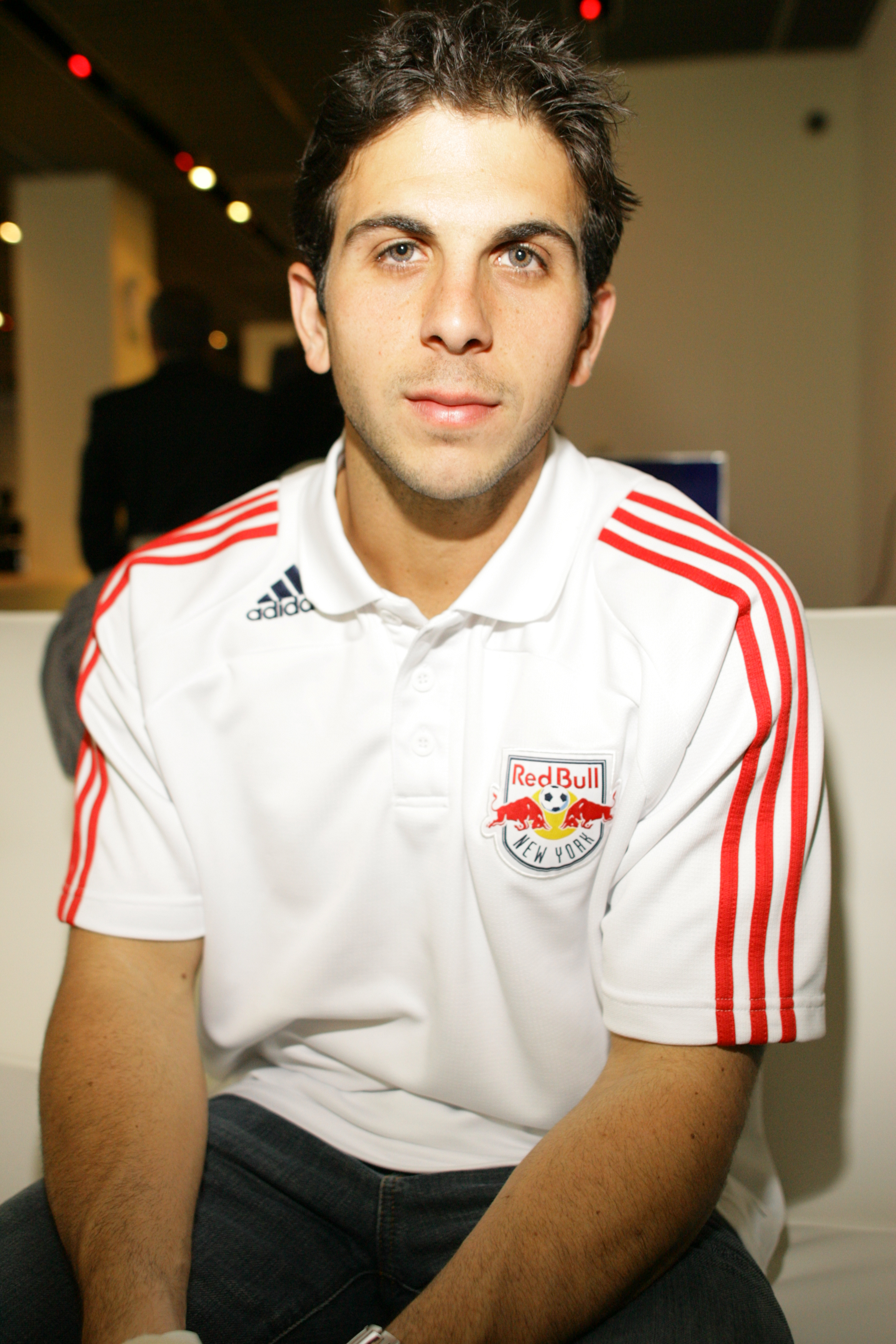 Carlos Mendes #4, Defender